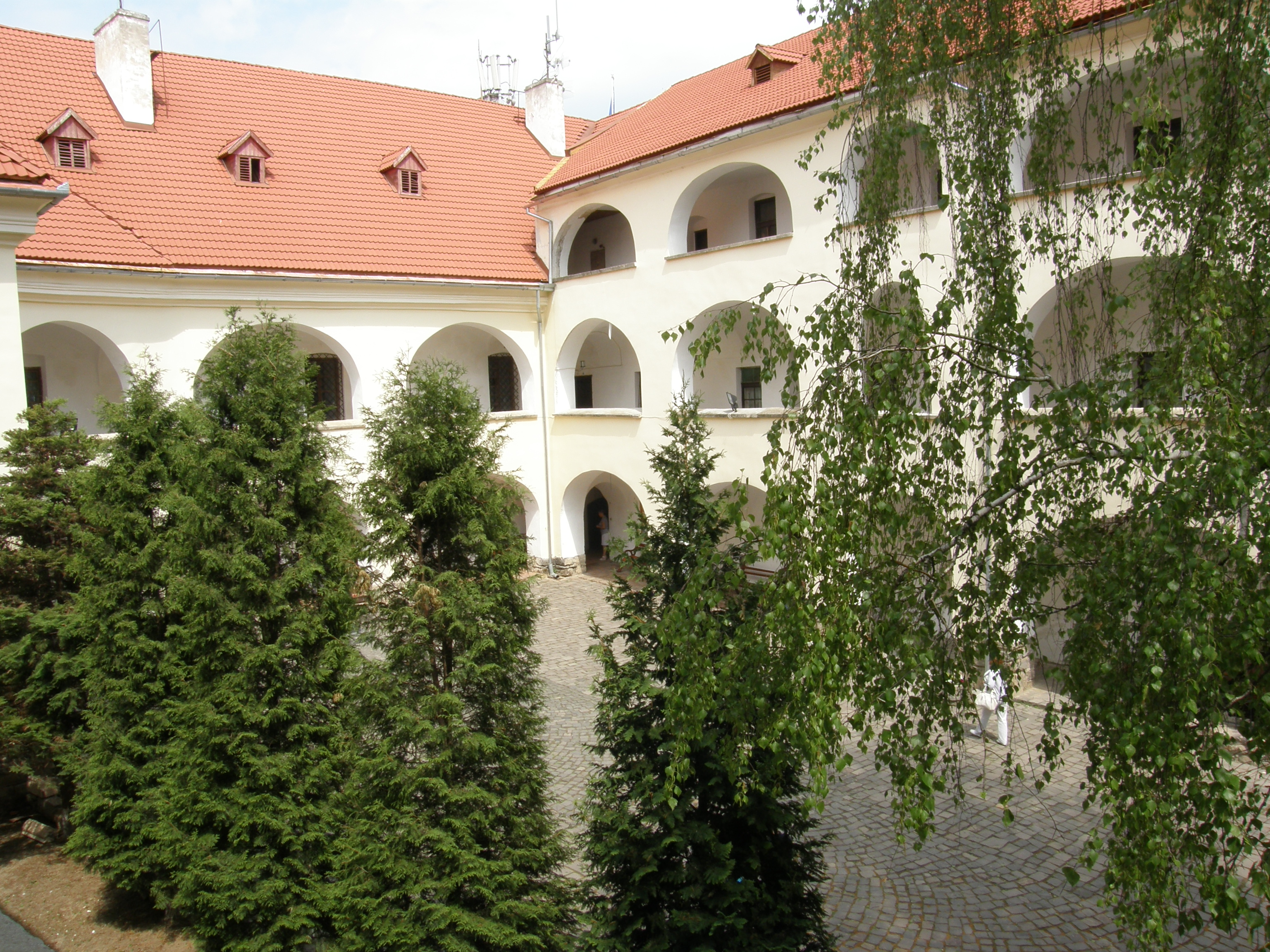 Mukachevo Castle